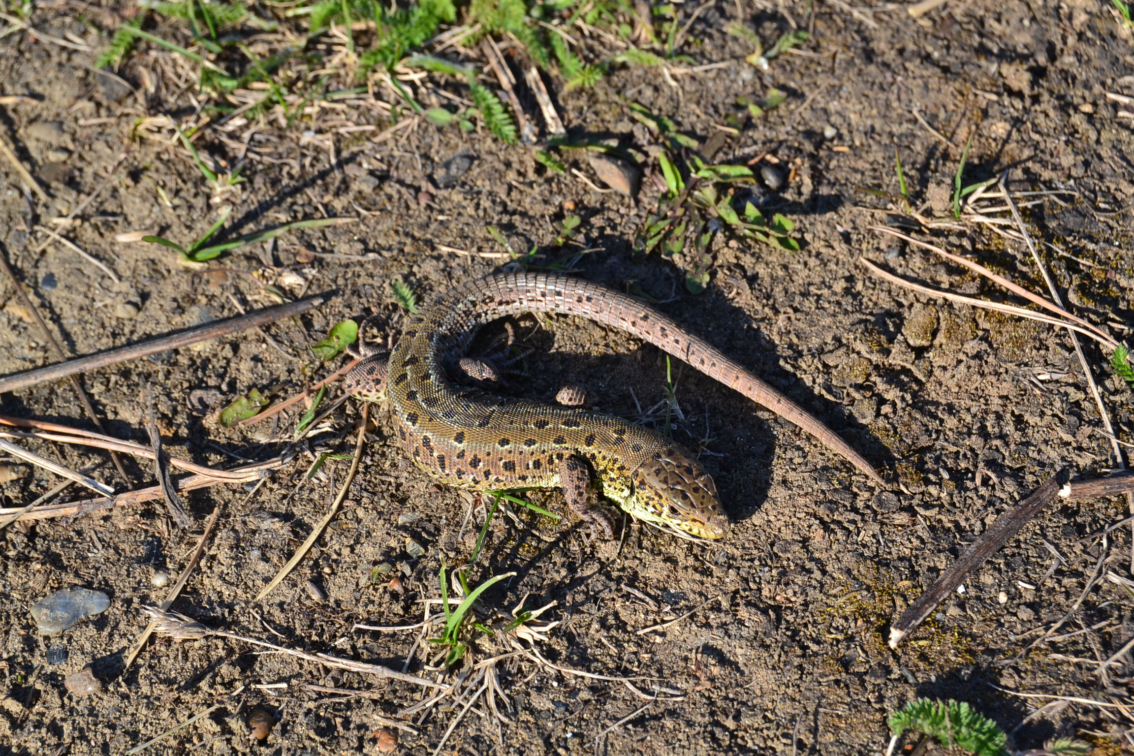 Прыткая ящерица на одной из террас парка